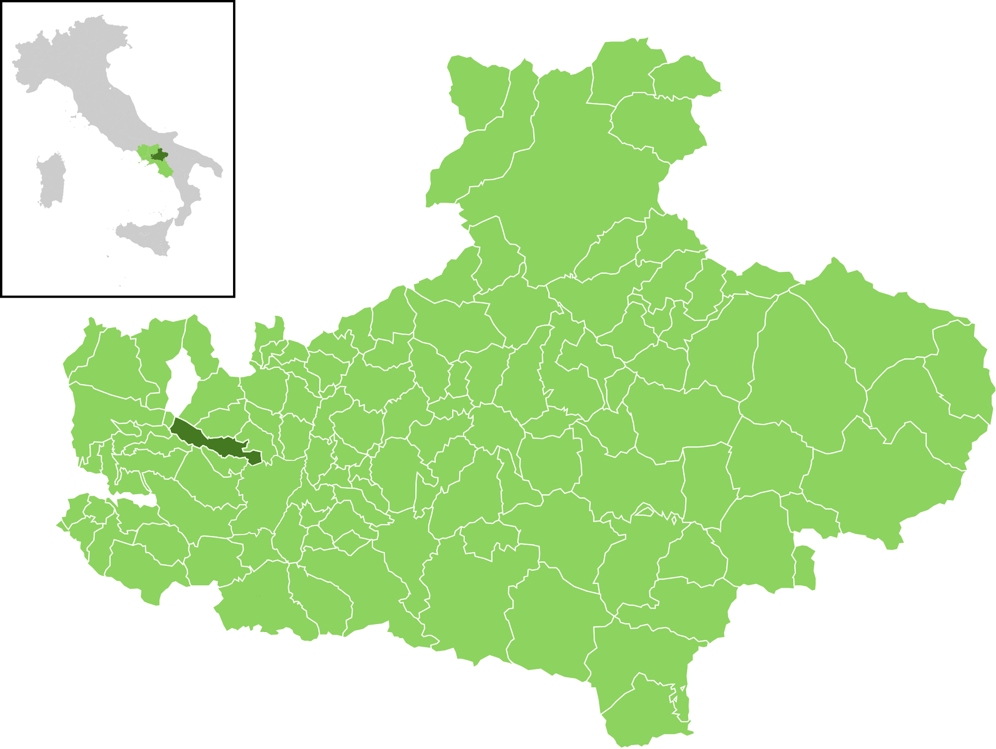 Posizione del comune all'interno della provincia di Avellino